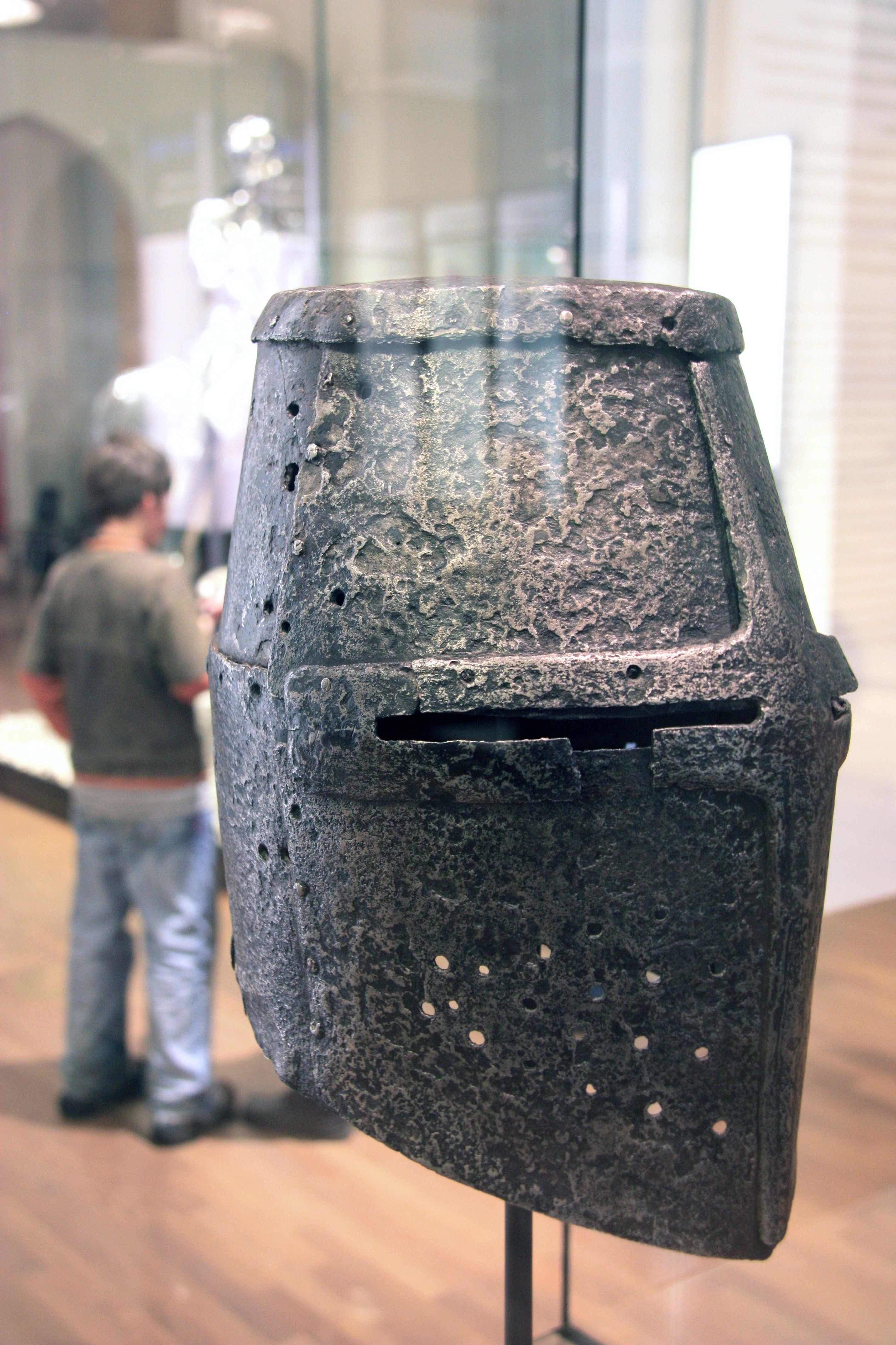 Topfhelm des 13. Jahrhunderts in einer Ausstellungsvitrine des Deutschen Historischen Museums in Berlin